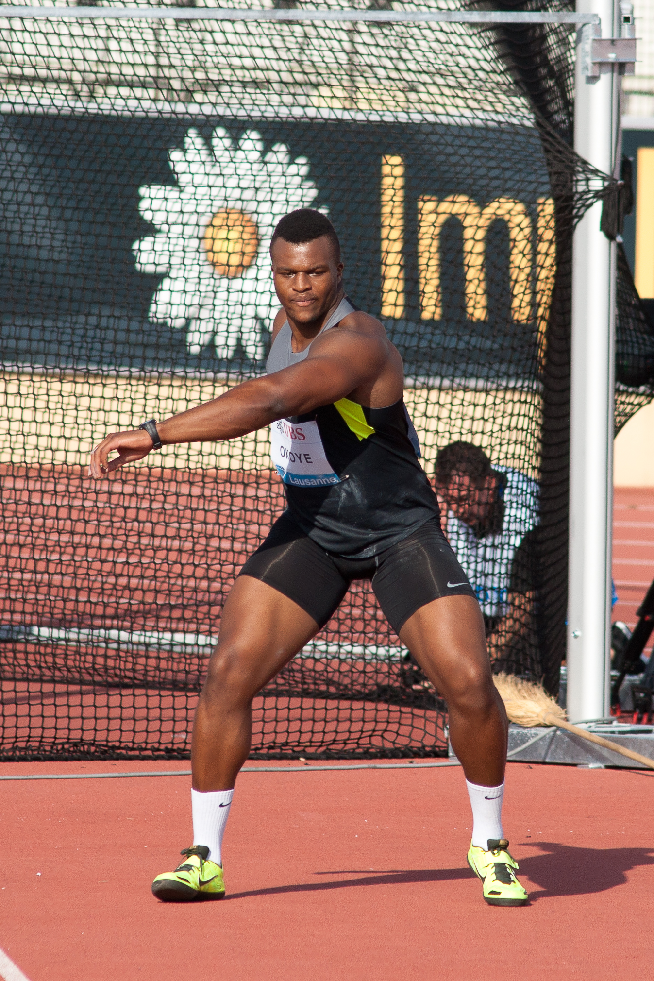 Athletissima 2012 - Lawrence Okoye